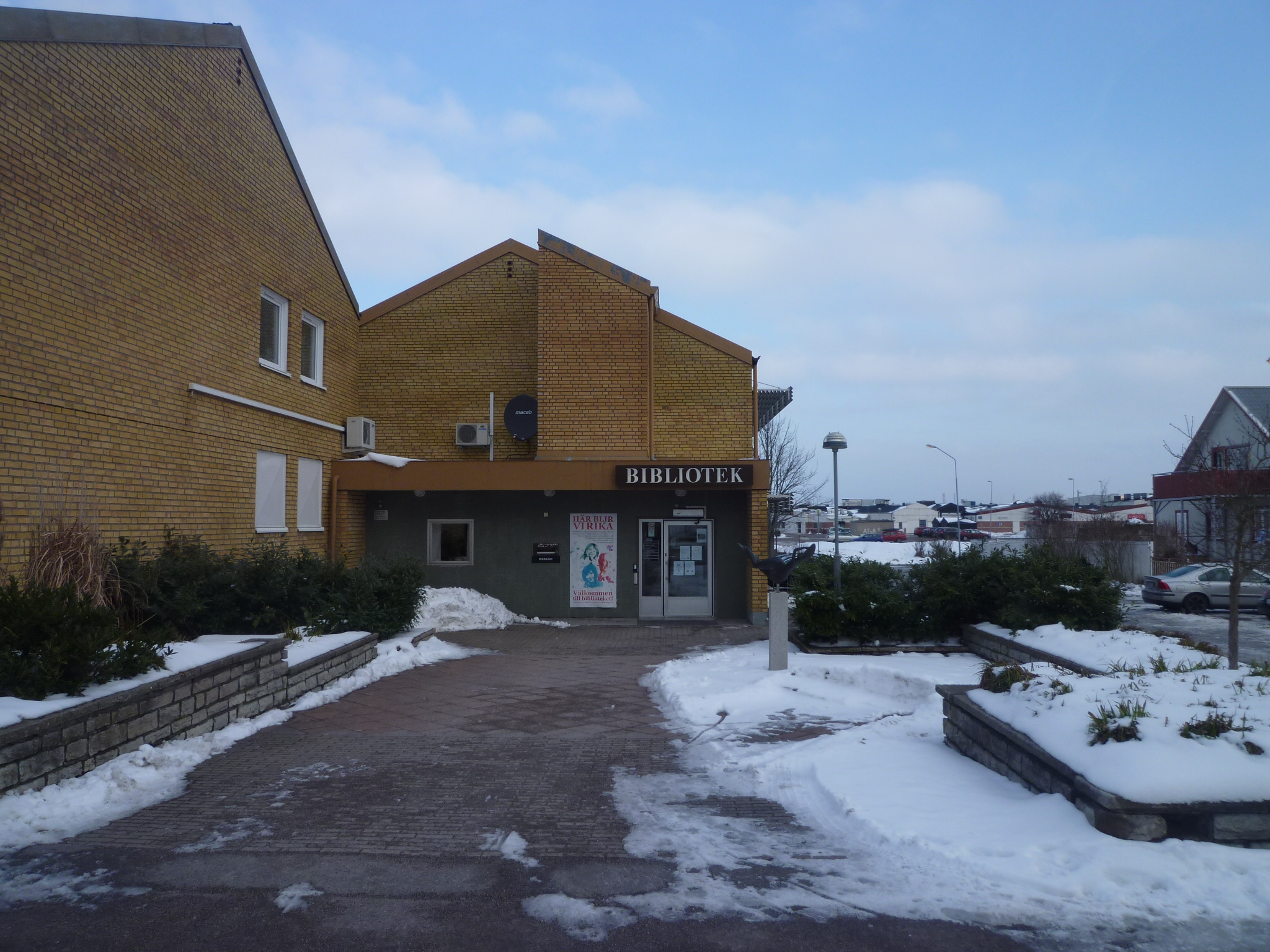 Ett lånekort är den enda nyckeln som behövs för att få en inblick i kunskapens magiska värld!